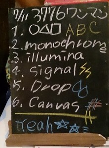 amiinaセトリボード(20150711(1))